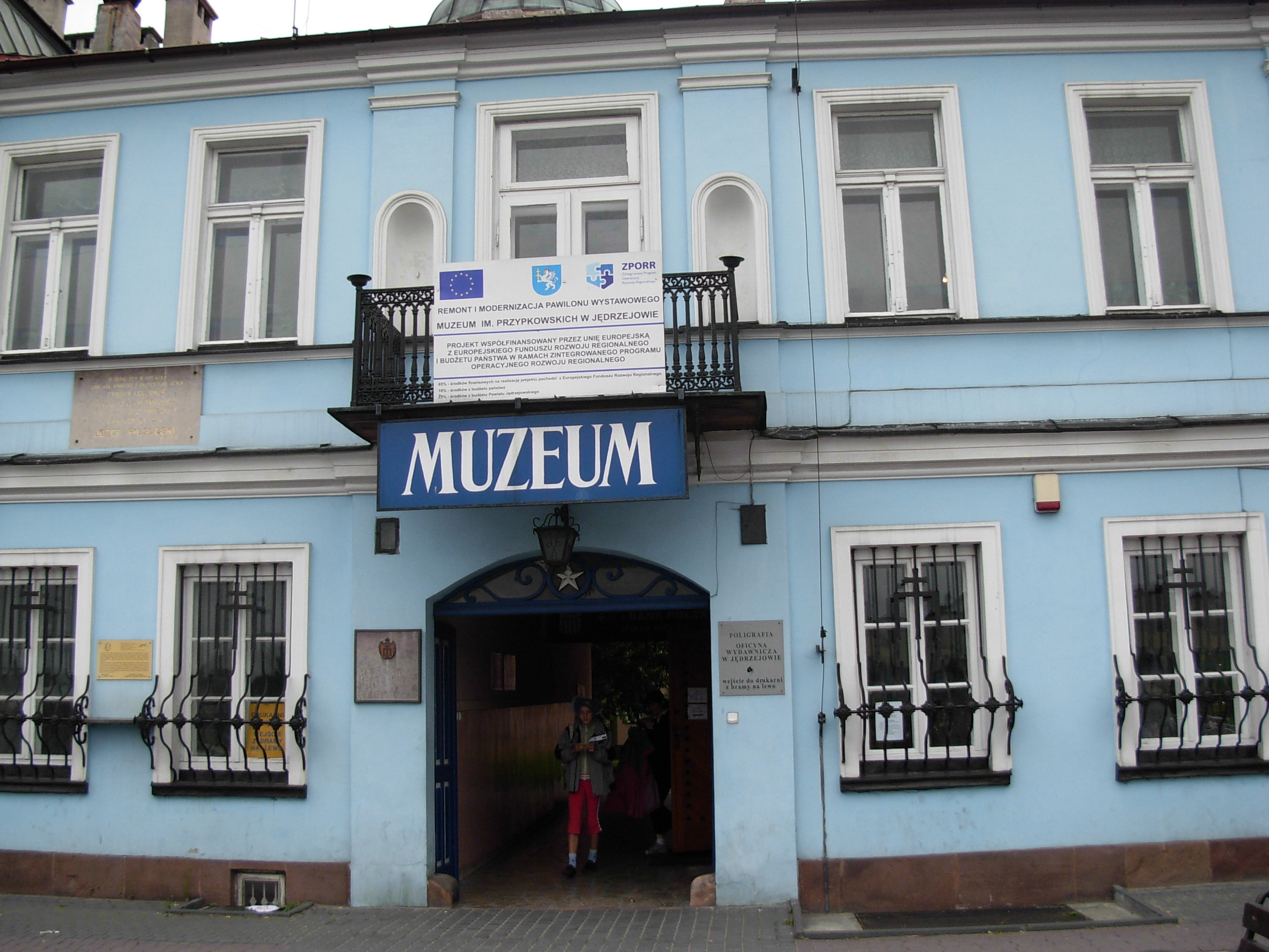 Description Przypkowscy Clock Museum in Jędrzejów DateJuly 2007SourceOwn workAuthorUser:Piotrus Przypkowscy Clock Museum in Jędrzejów